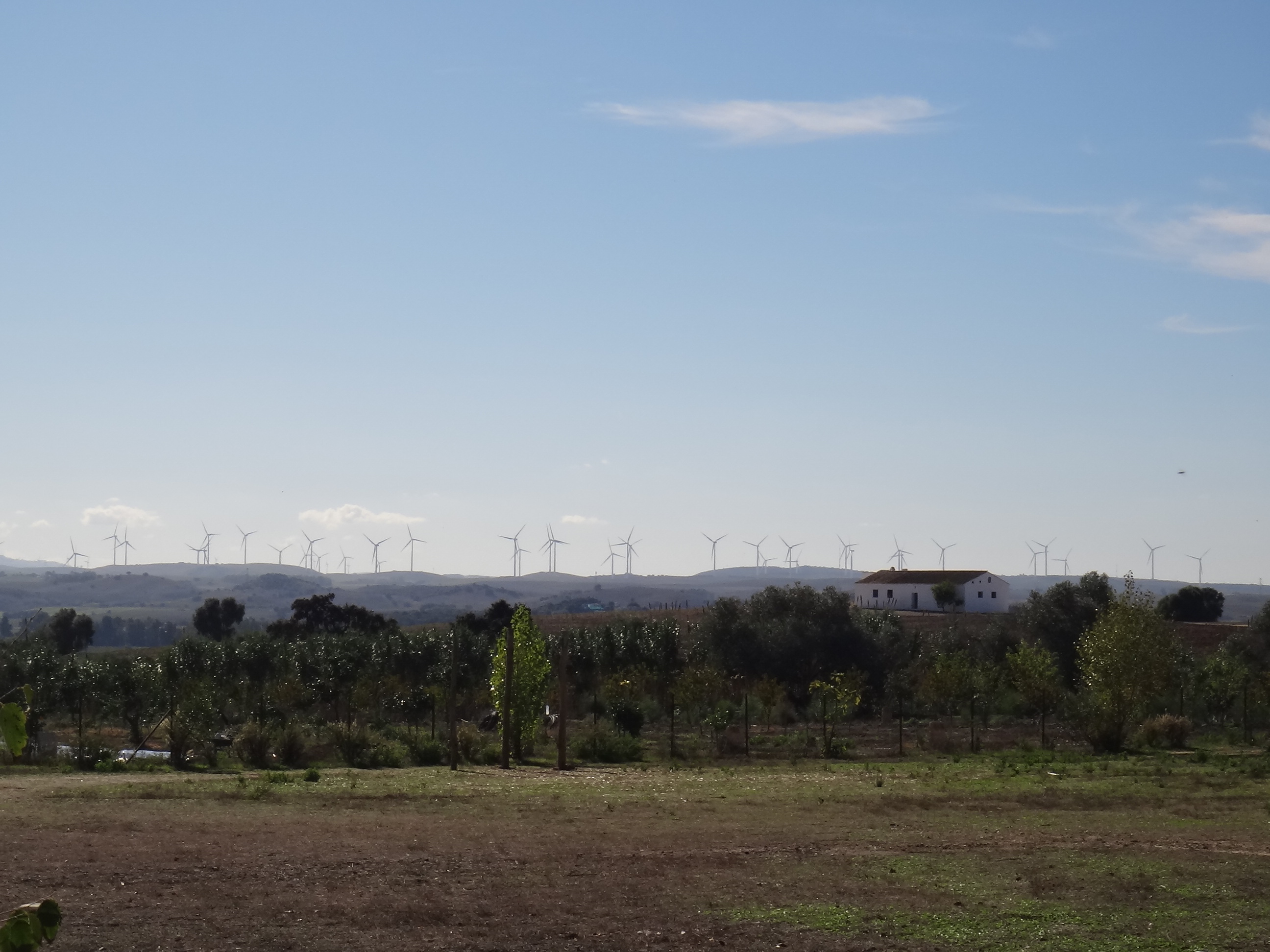 Campiña de Jerez con aerogeneradores desde Rancho Cortesano. Jerez (Andalucía, España)